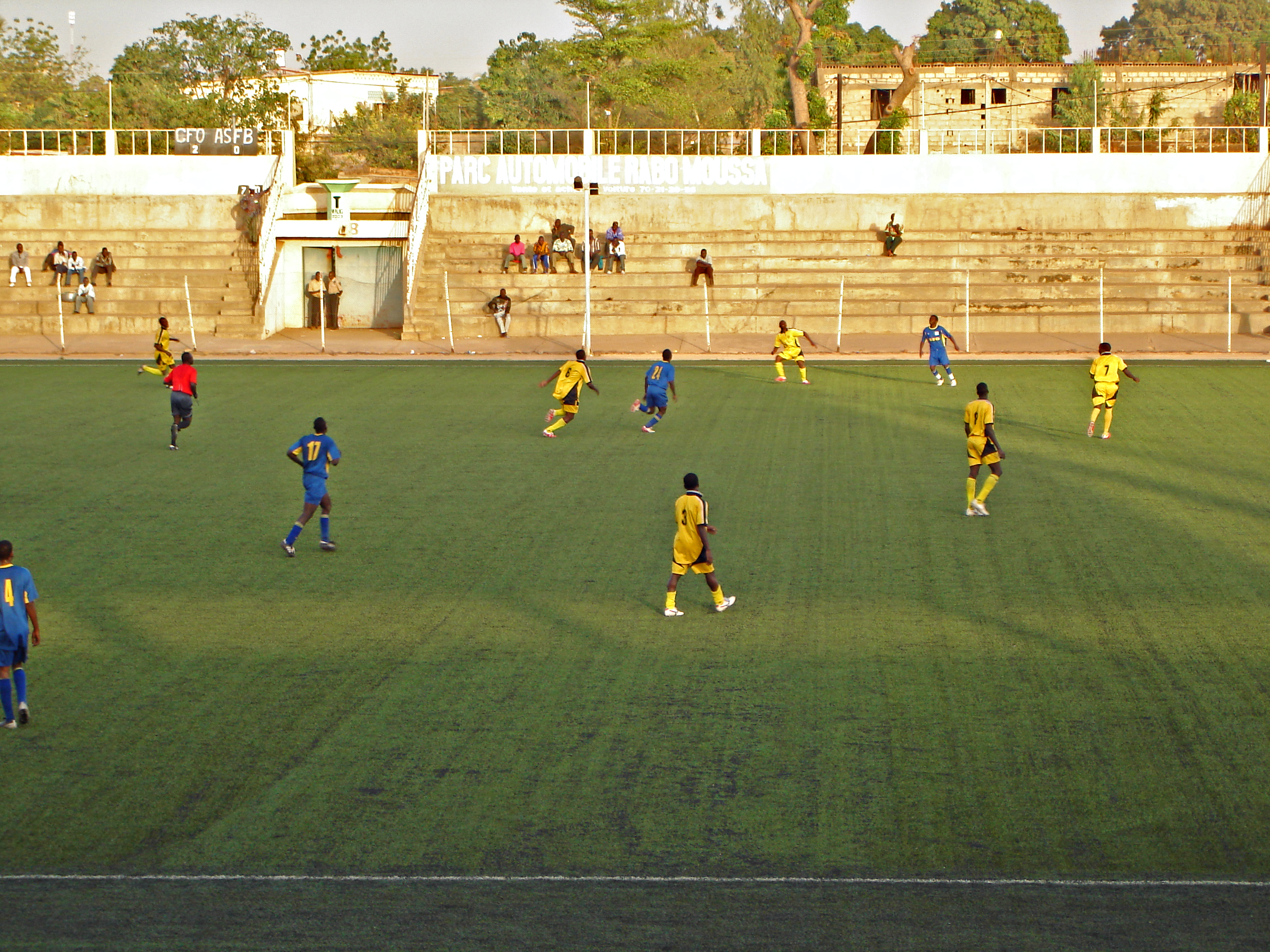 Burkina Faso: Spiel der Première Division zwischen CF Ouagadougou und ASF Bobo-Dioulasso im Stade Municipal de Ouagadougou